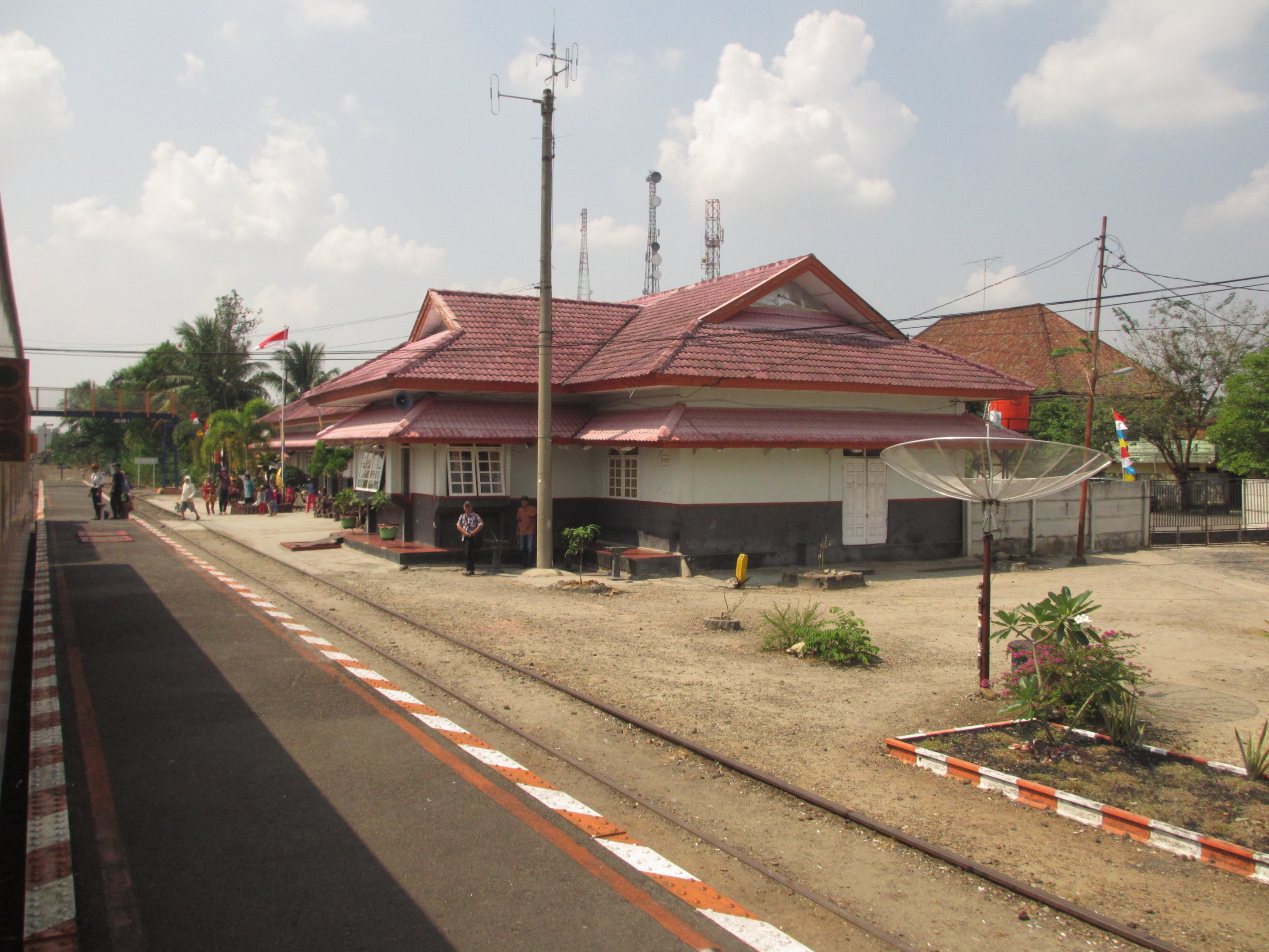 Stasiun Martapura, Kabupaten Ogan Komering Ulu Timur, Sumatera Selatan.